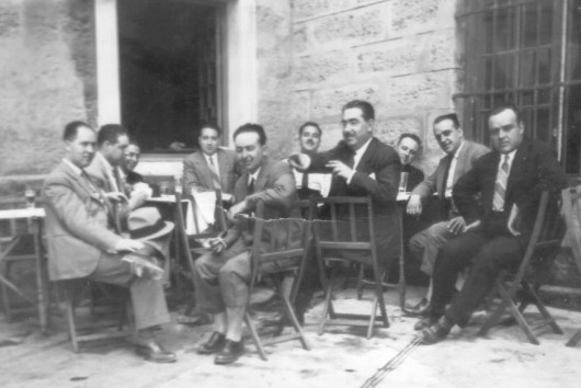 Herren trinken Wein, Jerez de la Frontera, Spanien